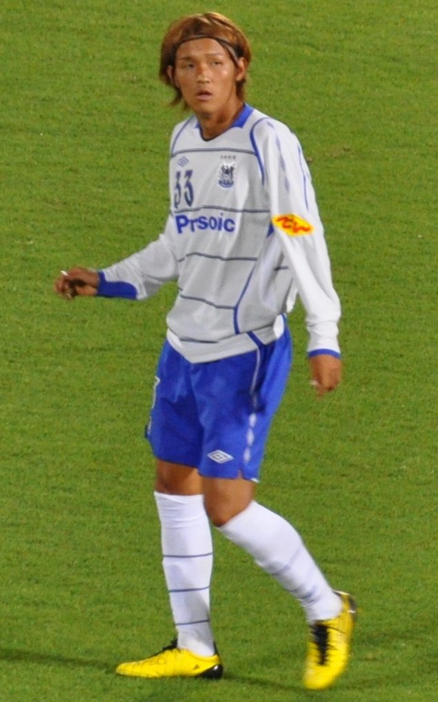 Usami playing for Gamba Osaka in a match against Kawasaki Frontale in September 2010. Kawasaki Frontale vs Gamba Osaka_277